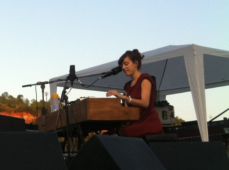 Maria Coma a Embassa't, Festival de Música a Sabadell, 2012.